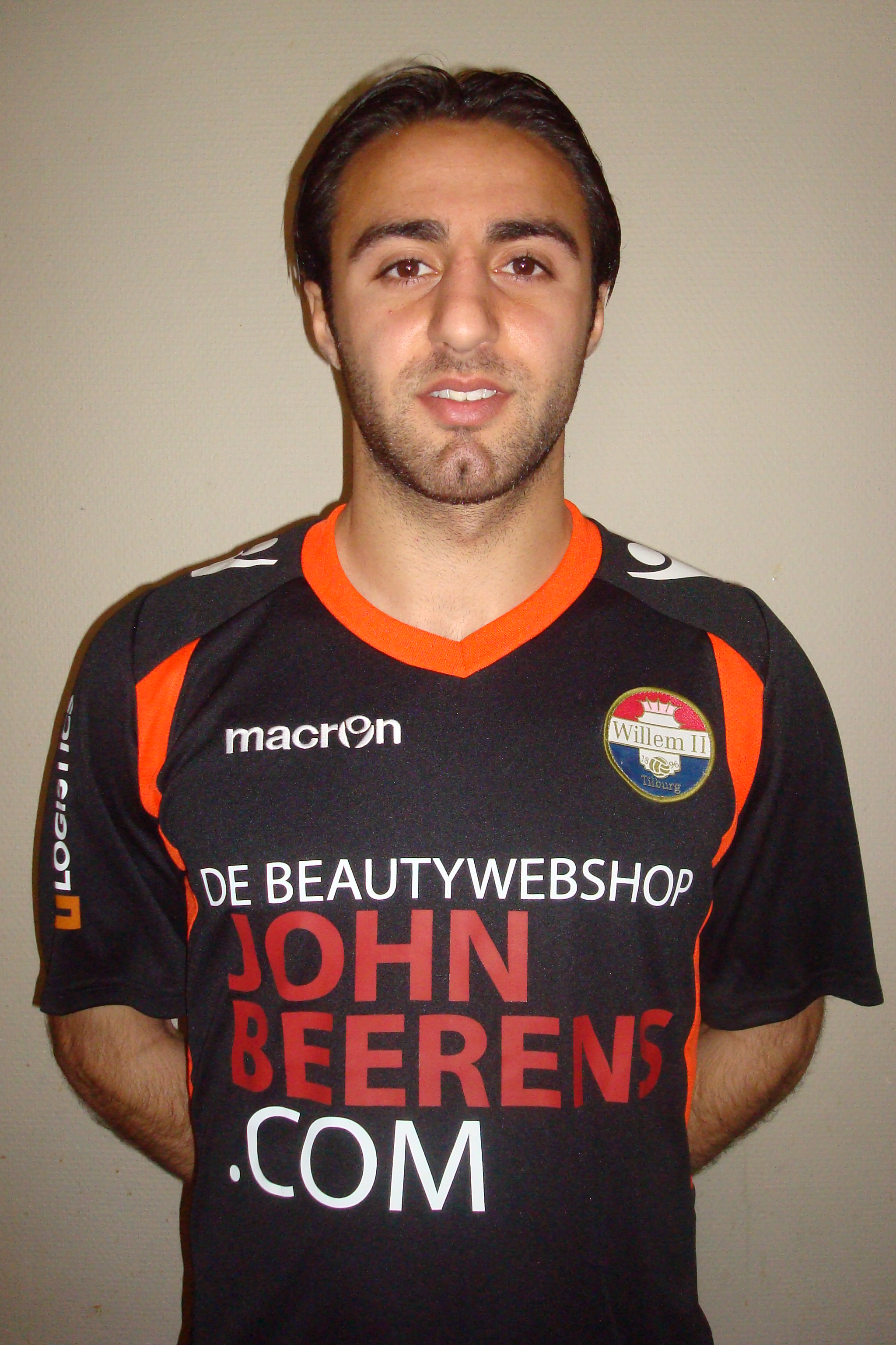 Gaby Jallo in het shirt van Willem II seizoen 2013/2014